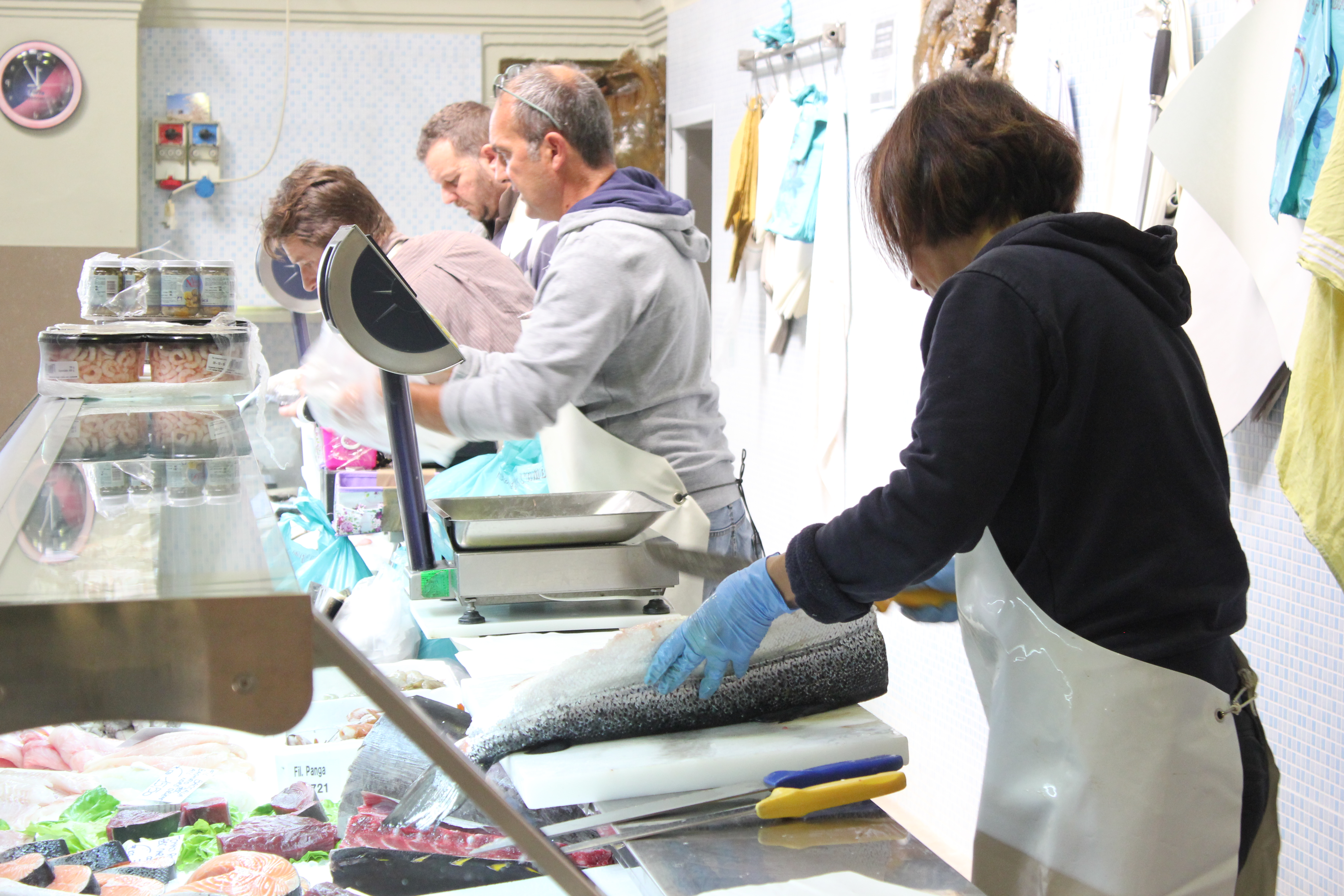 Mercato delle Erbe This is a photo of a monument which is part of cultural heritage of Italy.